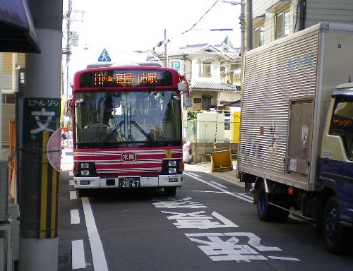 土居付近の狭隘区間を行く1系統